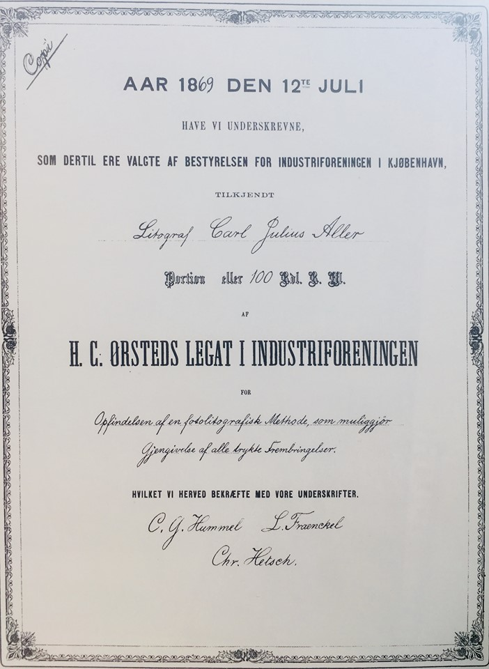 Carl Julius Allers H.C. Ørsted Legat for hans fotolitografiske trykketeknik